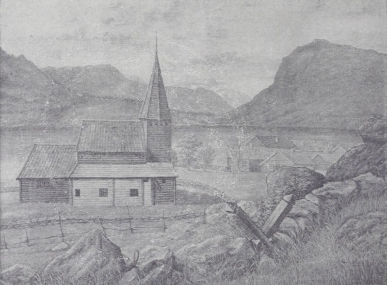 Hafslo stavkirke og prestegård. Bilde gjengitt i Jon Laberg: «Hafslo: Bygd og ætter» (Bergen, 1926).